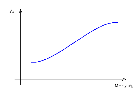 Griffenjószág (illusztráció a Fogyasztáselmélet (mikroökonómia) cikkhez)